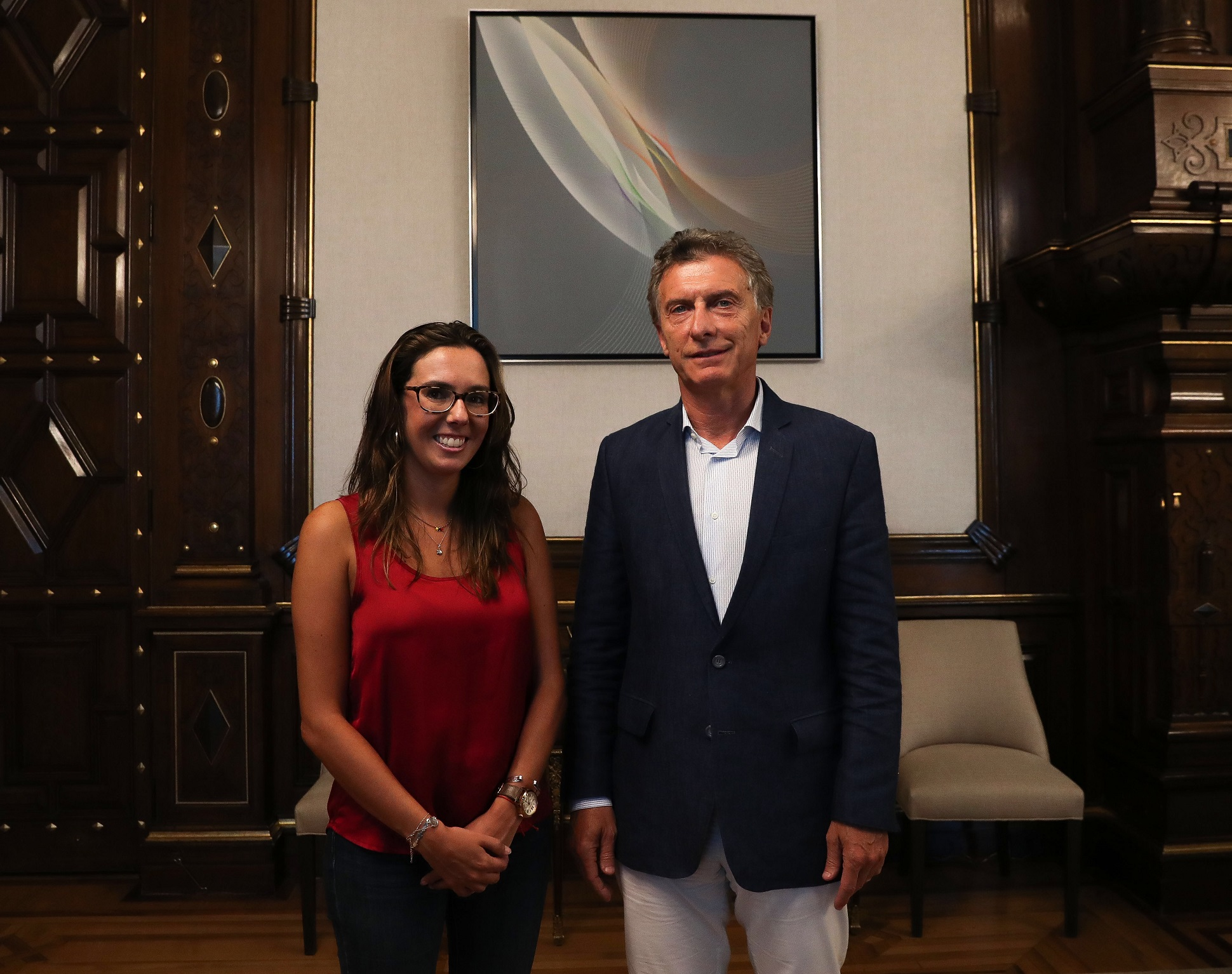 El presidente Mauricio Macri recibió en la Casa Rosada a Elisa Trotta, la representante enviada a Buenos Aires por el presidente encargado de Venezuela, Juan Guaidó.